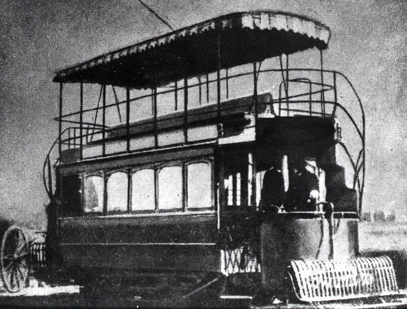 Carro Electrico, recorrido entre Concepción y Talcahuano